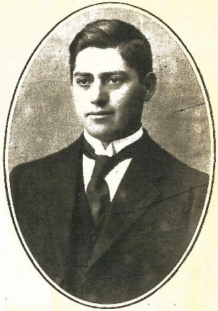 Francisco Melivilu en una crónica de la Revista Sucesos de 1923 titulada "Un candidato araucano". Francisco Melivilu Henríquez fue abogado y político chileno de origen mapuche.